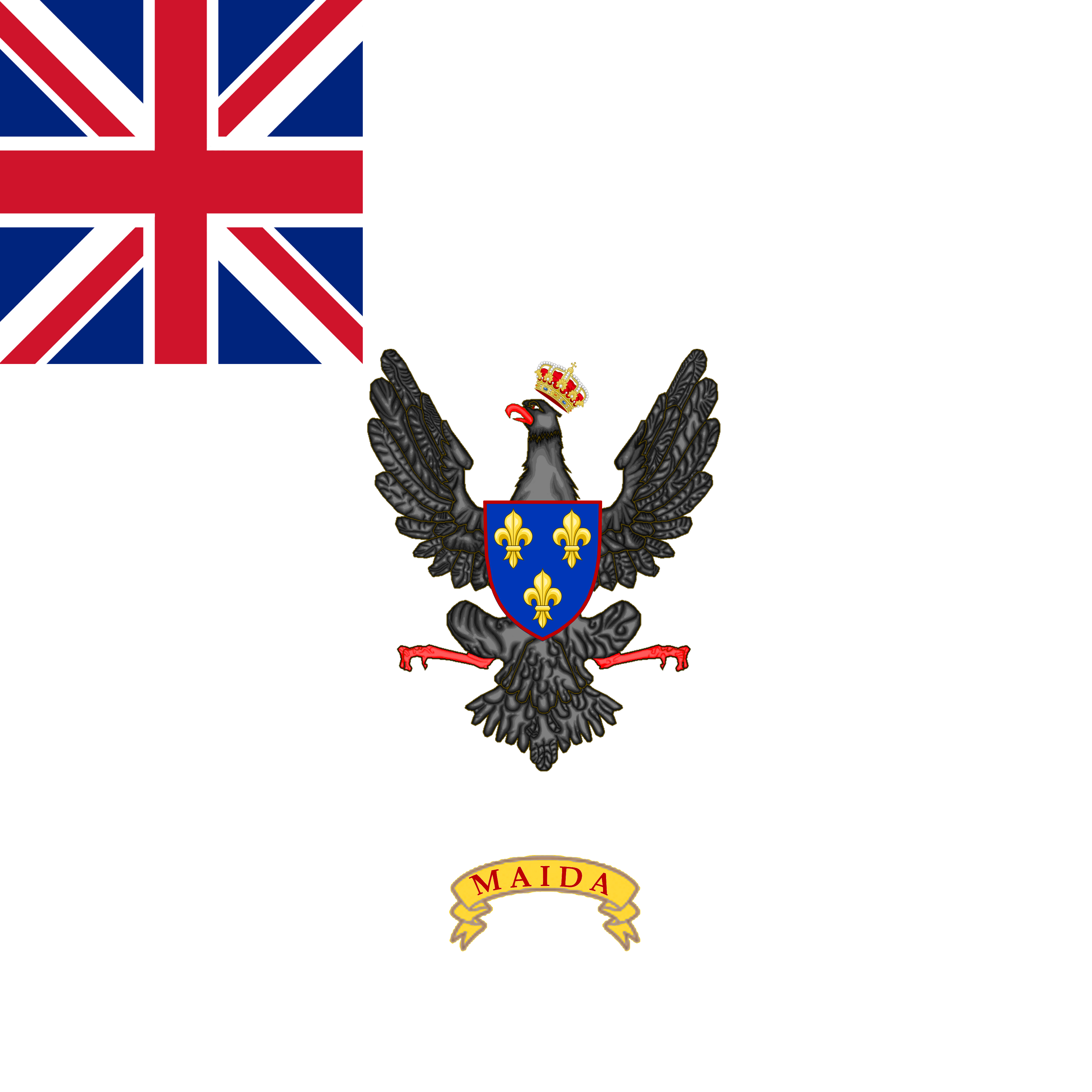 Regimental Colours of the Royal Sicilian Regiment of Foot, reconstructed on the extant description of the flag